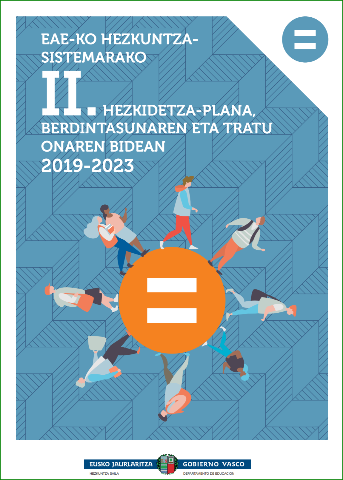 Euskal Autonomia Erkidegoko Administrazioa. Hezkuntza, Hizkuntza Politika eta Kultura Sailak 2019an sustaturiko II. hezkidetza plana